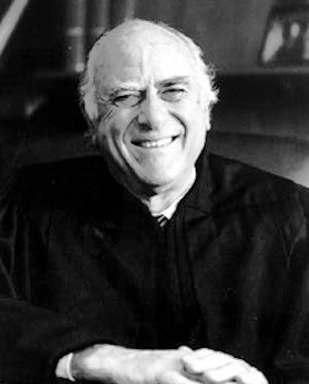 Judge Jack B. Weinstein